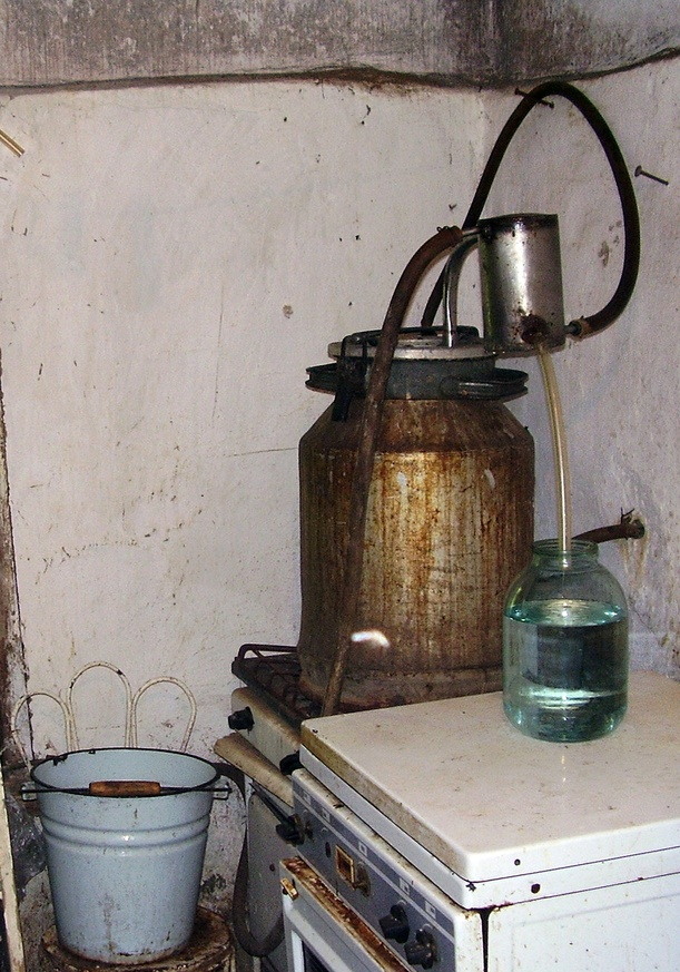 Самогонный аппарат. Краснодарский край, Россия.